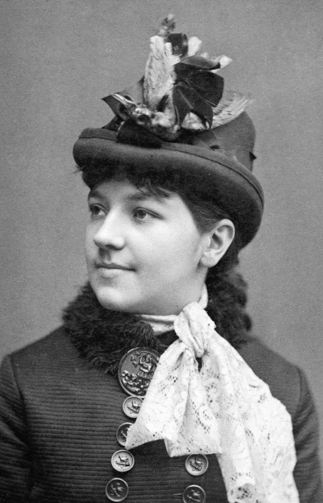 Erika Kristina Bergenson, sångare vid Kungliga Operan 1885